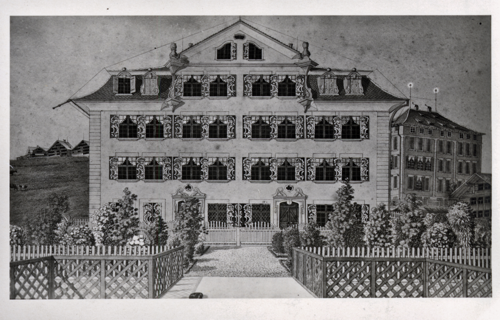 Ansicht des Sonnenhofs in Trogen, Reproduktion des Federaquarells von Johann Ulrich Fitzi von ca. 1822.